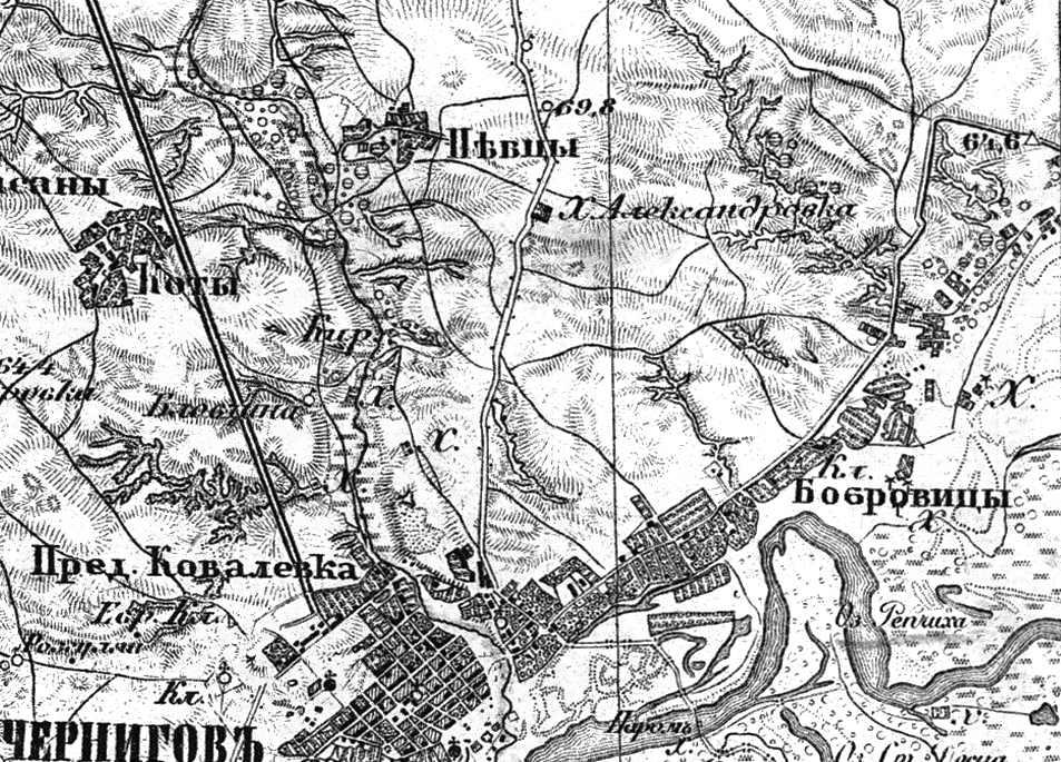 Східна місцевість Чернігова на карті 1846 року.